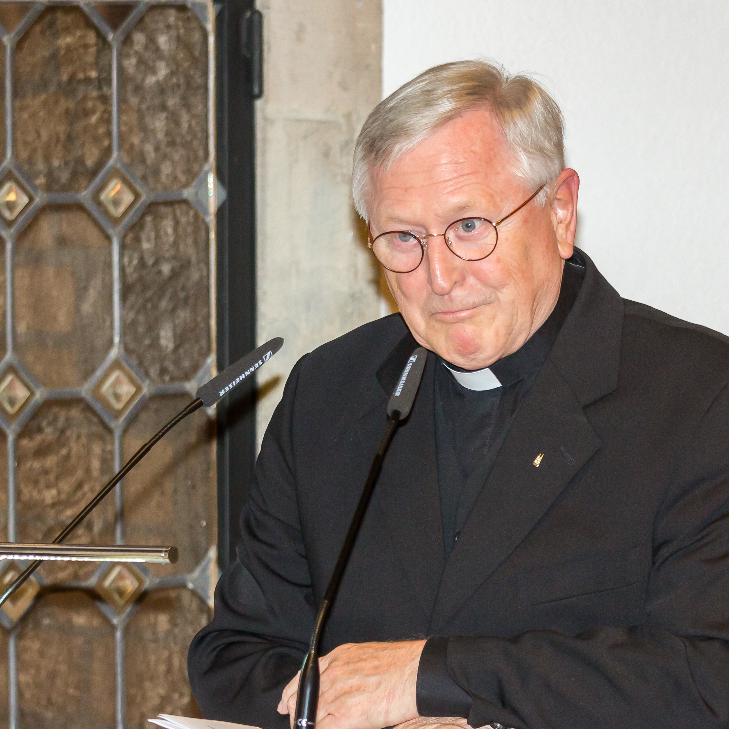 Verleihung des Europäischen Handwerkspreises an Karl Kardinal Lehmann Manfred Melzer, Weihbischof im Erzbistum Köln